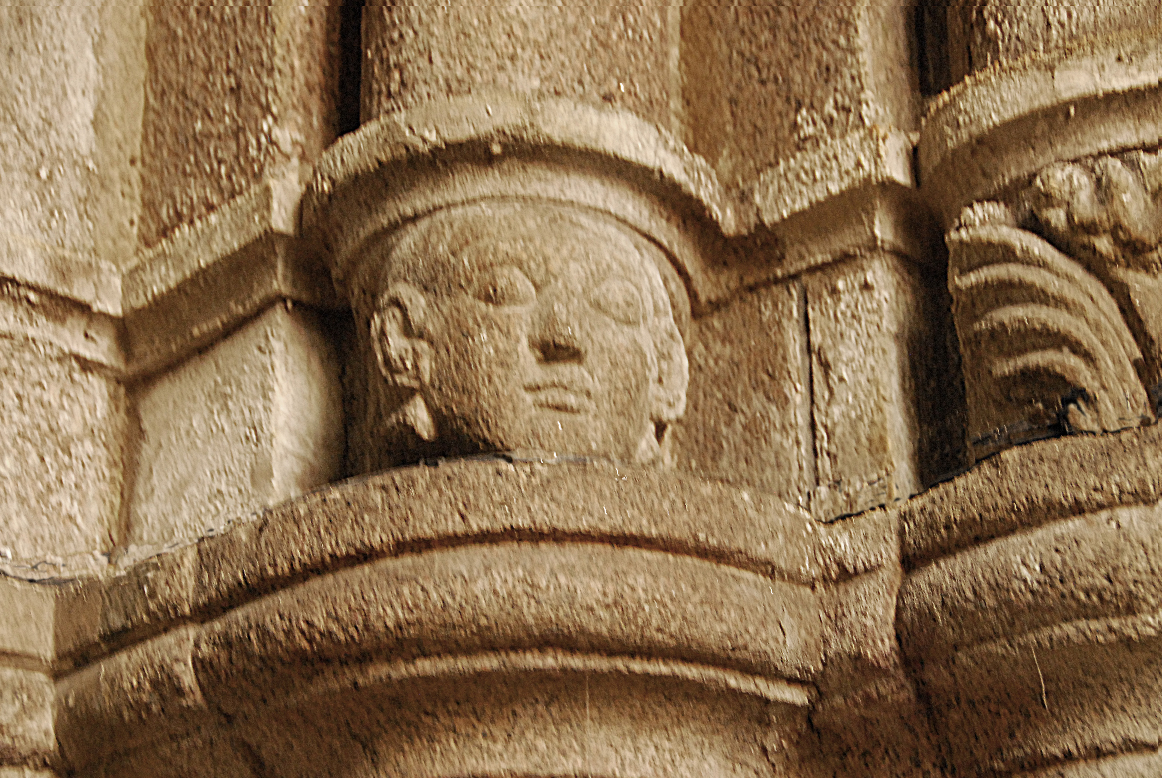 N.-D. de La Souterraine, Bündelpfeiler mit Kopf und Pflanze